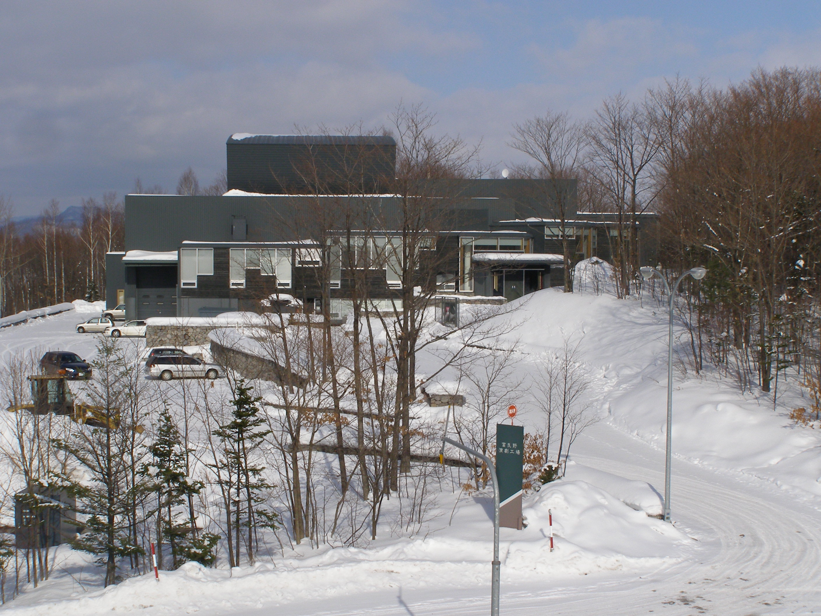 富良野演劇工房 (北海道富良野市)